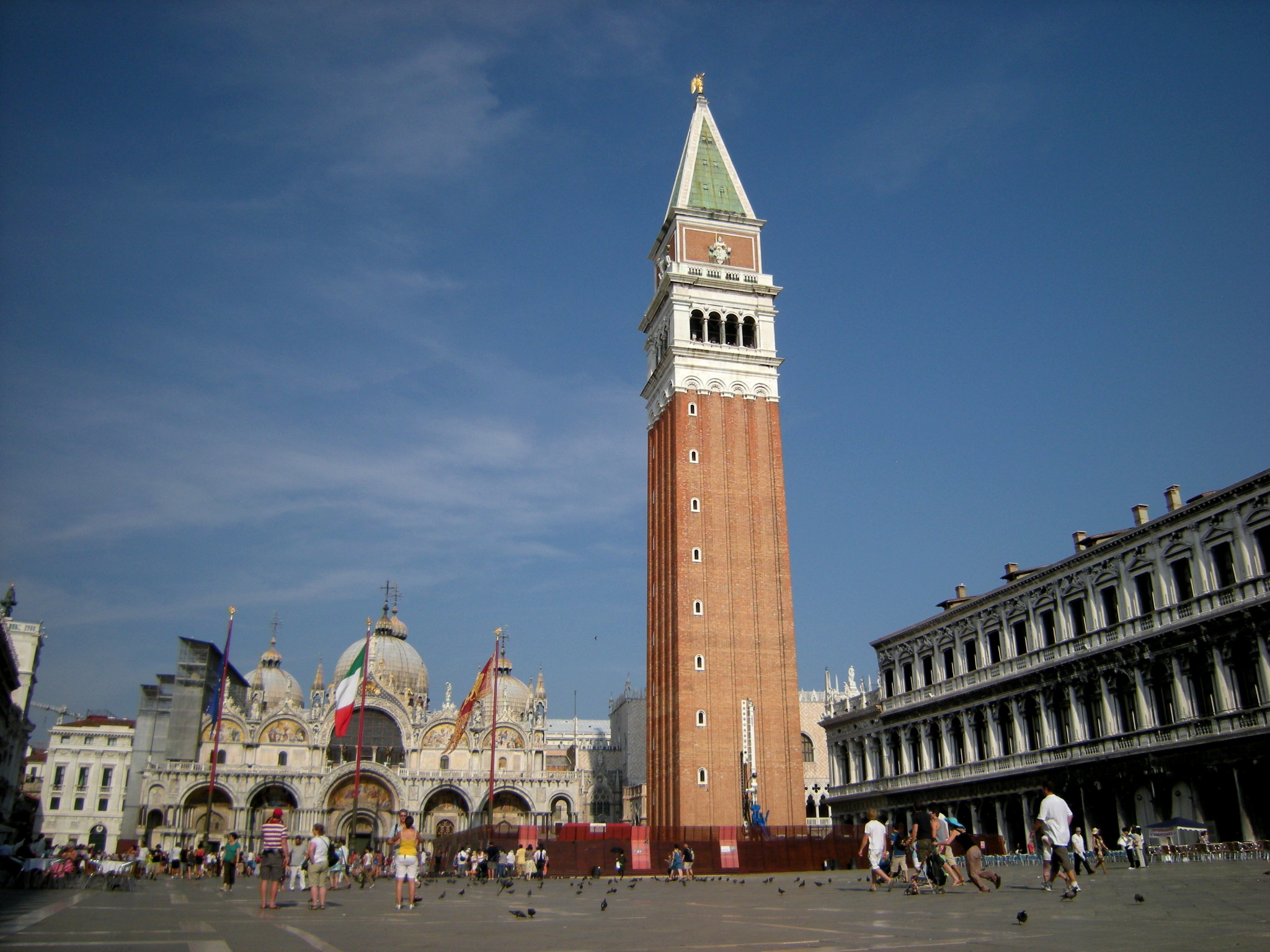 Veneza